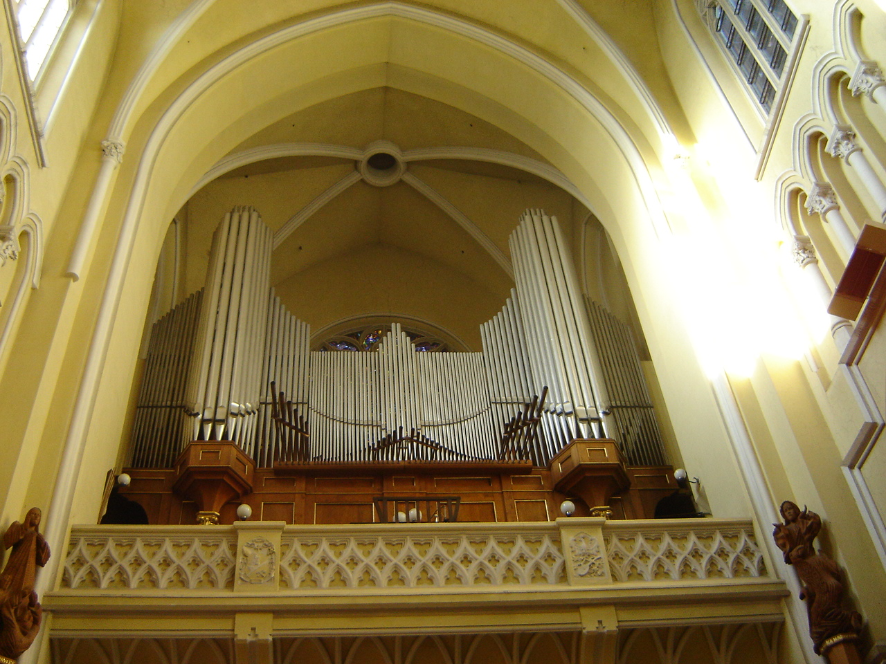 Bazylika archikatedralna Świętej Rodziny w Częstochowie. Chór muzyczny i organy Biernackiego z 1949 roku. W prospekcie m.in. miedziane piszczałki trąbki hiszpańskiej